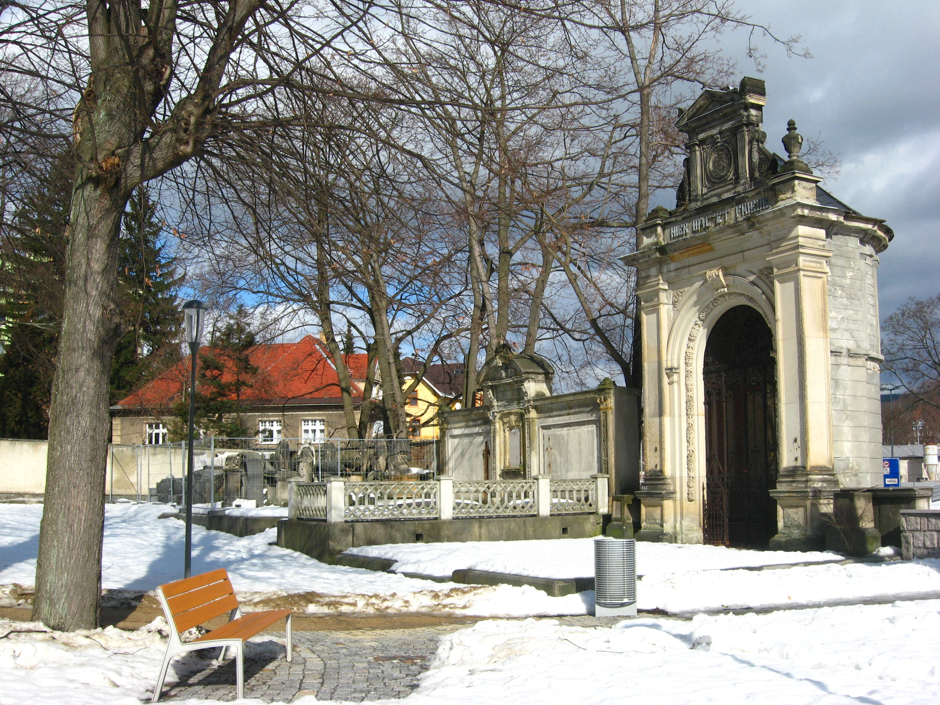 Hrobka - dvě hrobky, patnáct náhrobků a sochy z hlavní brány (Liberec), hřbitov, ul. Budyšínská, Liberec